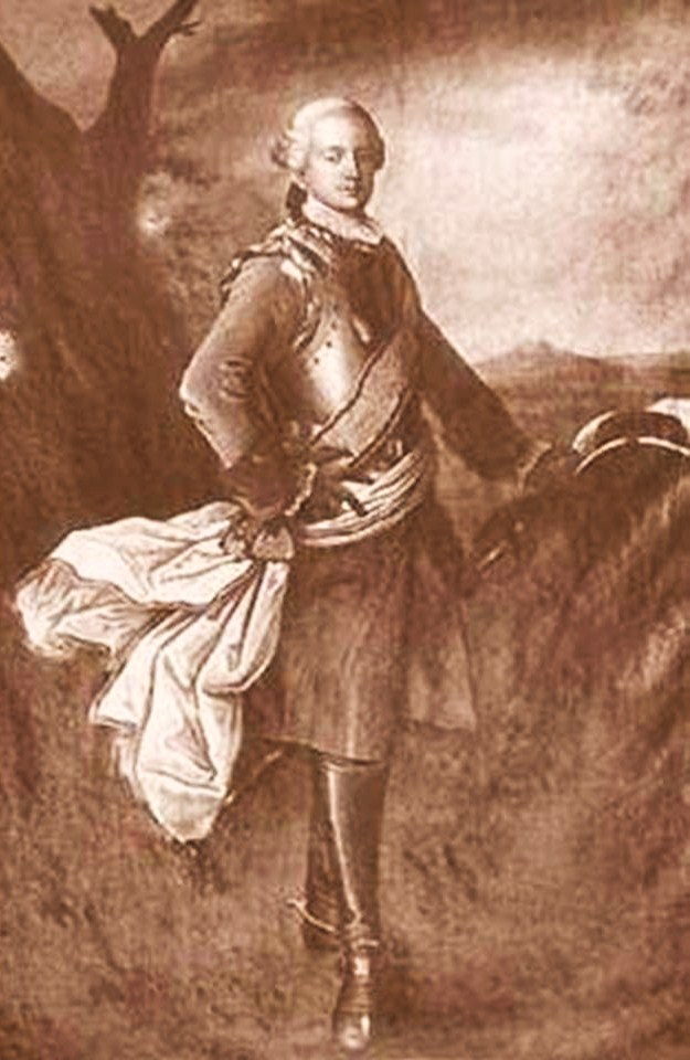 Franz Karl von der Leyen: zeitgenössische Grafik; Archiv der Kreisverwaltung des Saarpfalz-Kreises